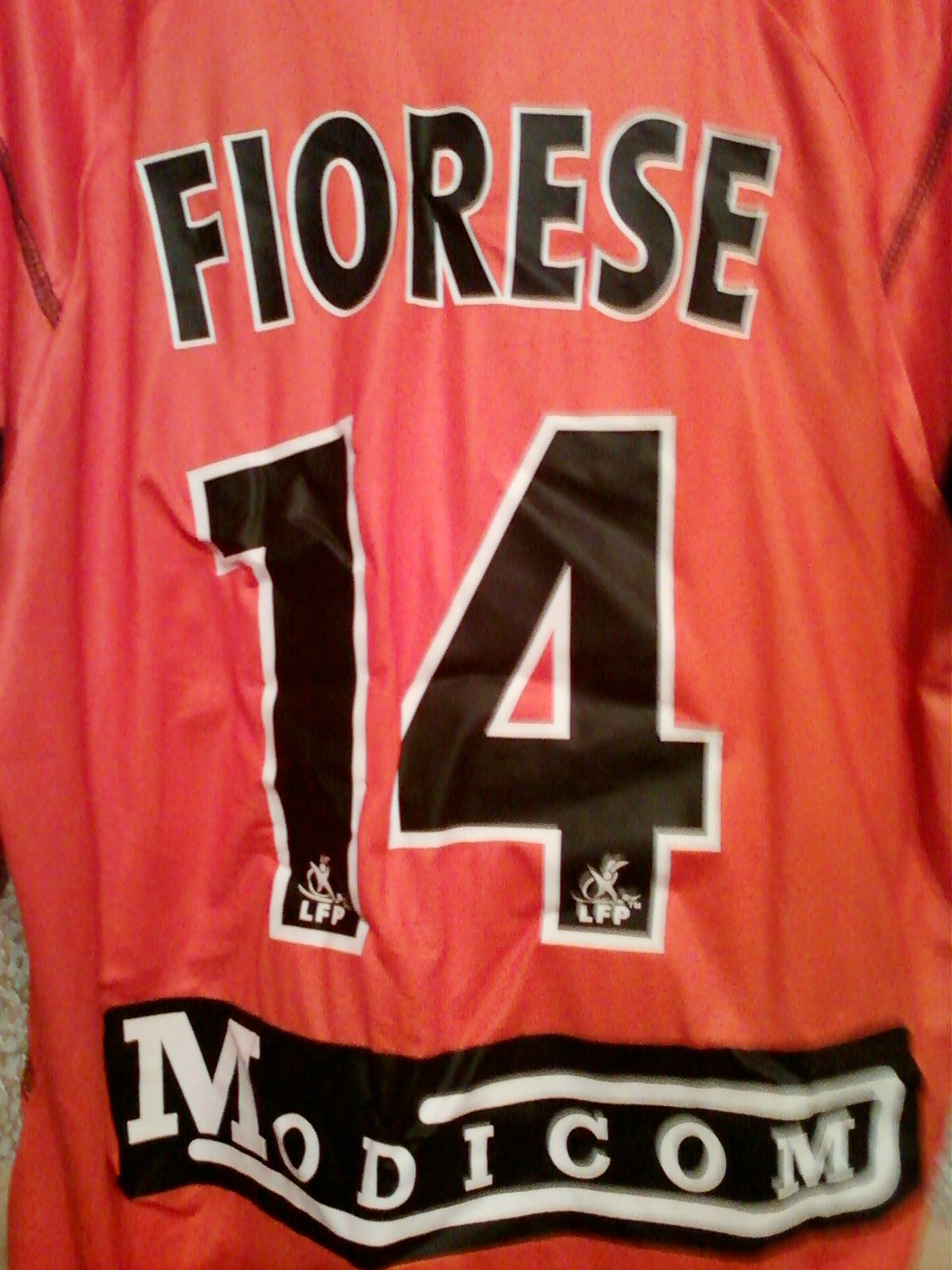 Dos du maillot domicile de Fabrice Fiorèse lors de la saison 2006-2007